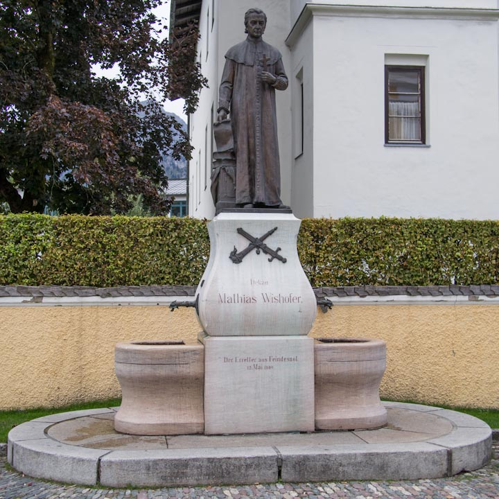 Doppelbrunnen, Wieshofer-Denkmal. Die Statue von Matthias Wieshofer (1752-1819) wurde 1908 anlässlich der bevorstehenden Hundertjahrfeier des Tiroler Aufstandes von 1809 vom Bildhauer Norbert Pfretzschner geschaffen.